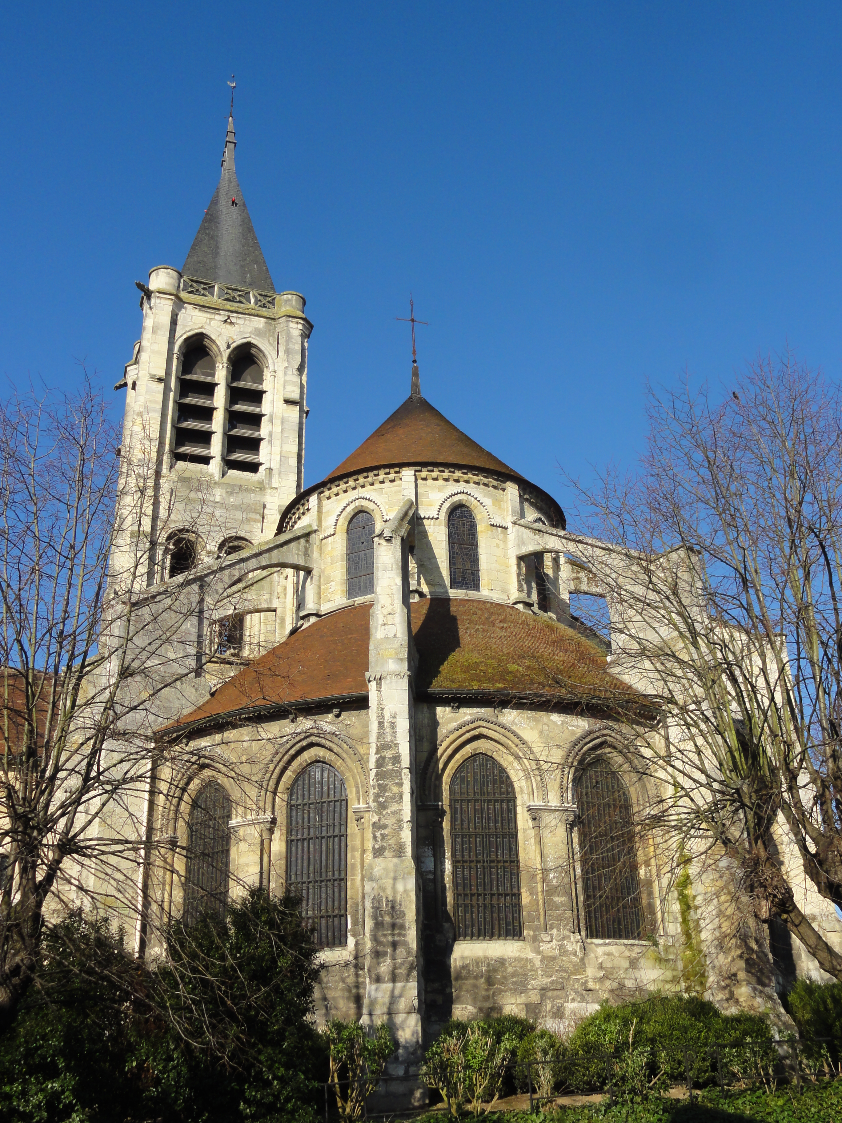 Église Saint-Pierre-Saint-Paul de Gonesse - voir titre.